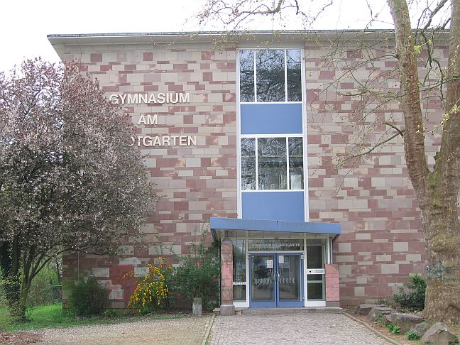 SGS Saarlouis